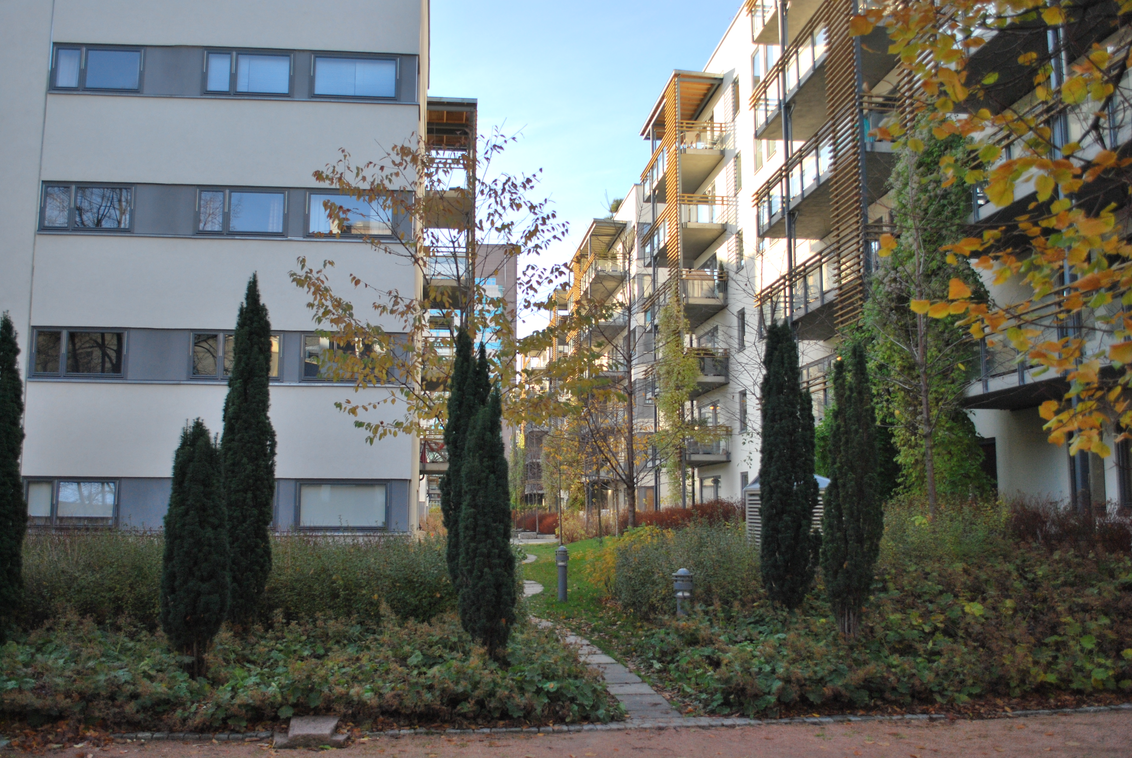 Pilestredet park nr. 22 og 27 og gangsti mellom bygningene